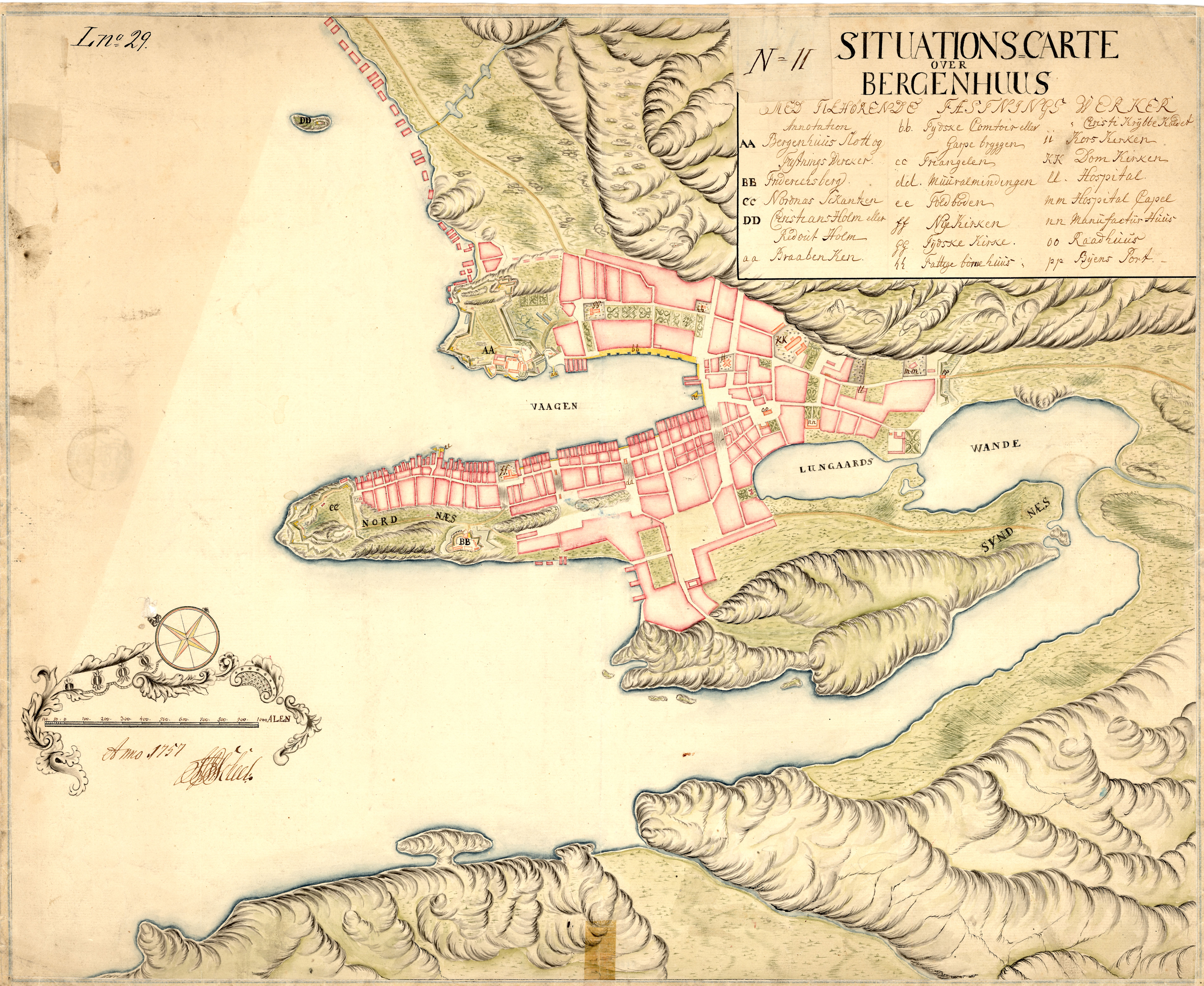 Situations Carte over Bergenhuus med tilhørende Fæstningswerker.